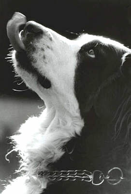 Berner Sennenhündin: "Bella vom Alpenblick" Fotograf: Walter J. Pilsak, Waldsassen